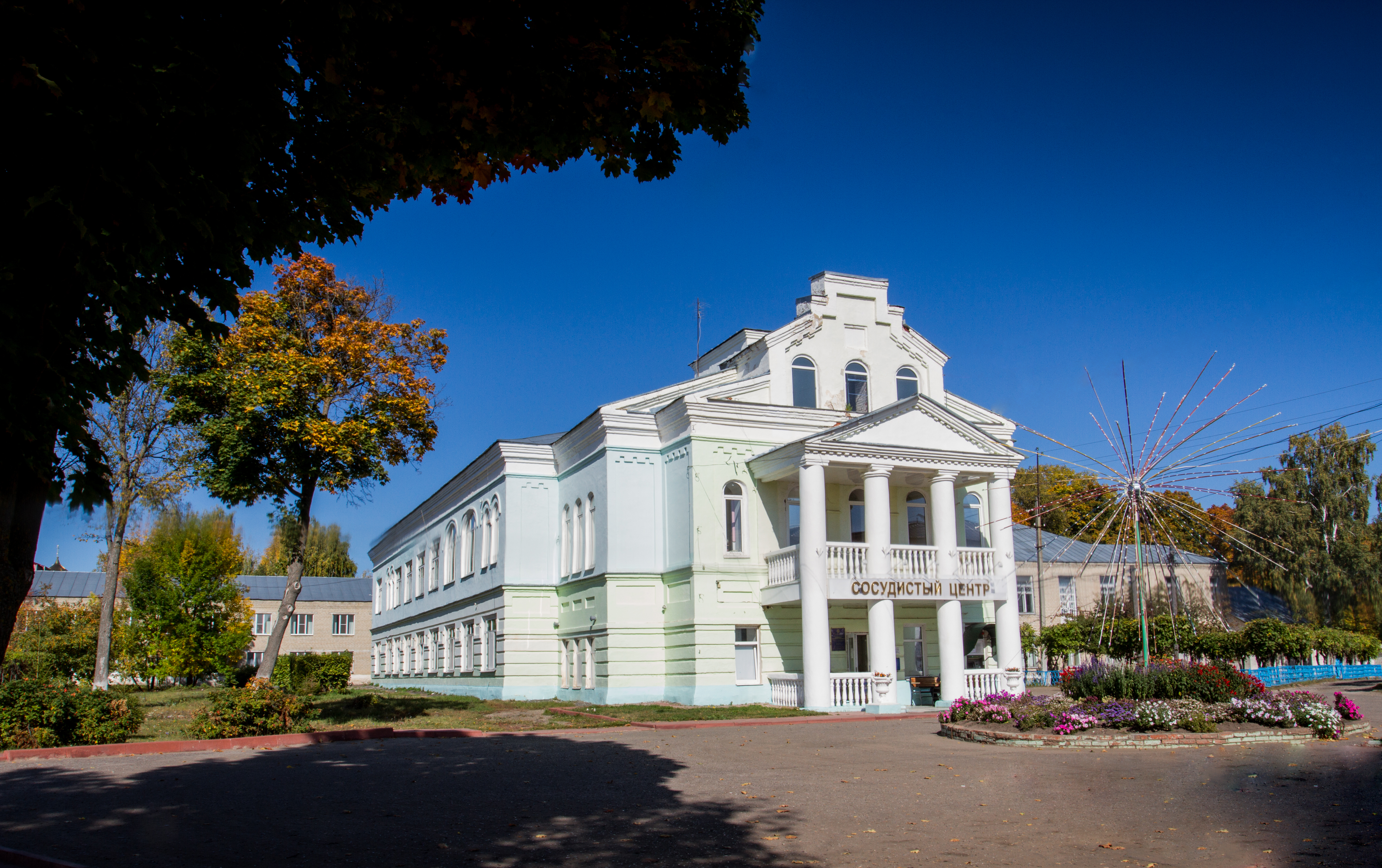 Келейный корпус с домовой церковью Александра Невского: улица Кирова, 76, Краснослободск, Краснослободский район, Мордовия